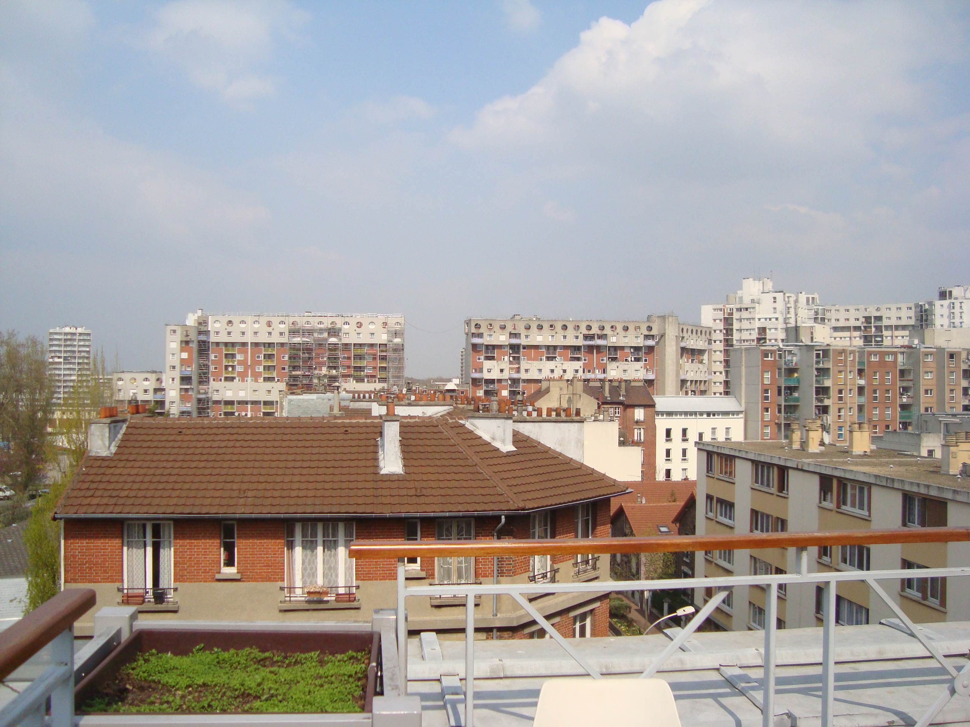 Vue du centre ville de La Courneuve prise du 3e étage de l'Hôtel de Ville